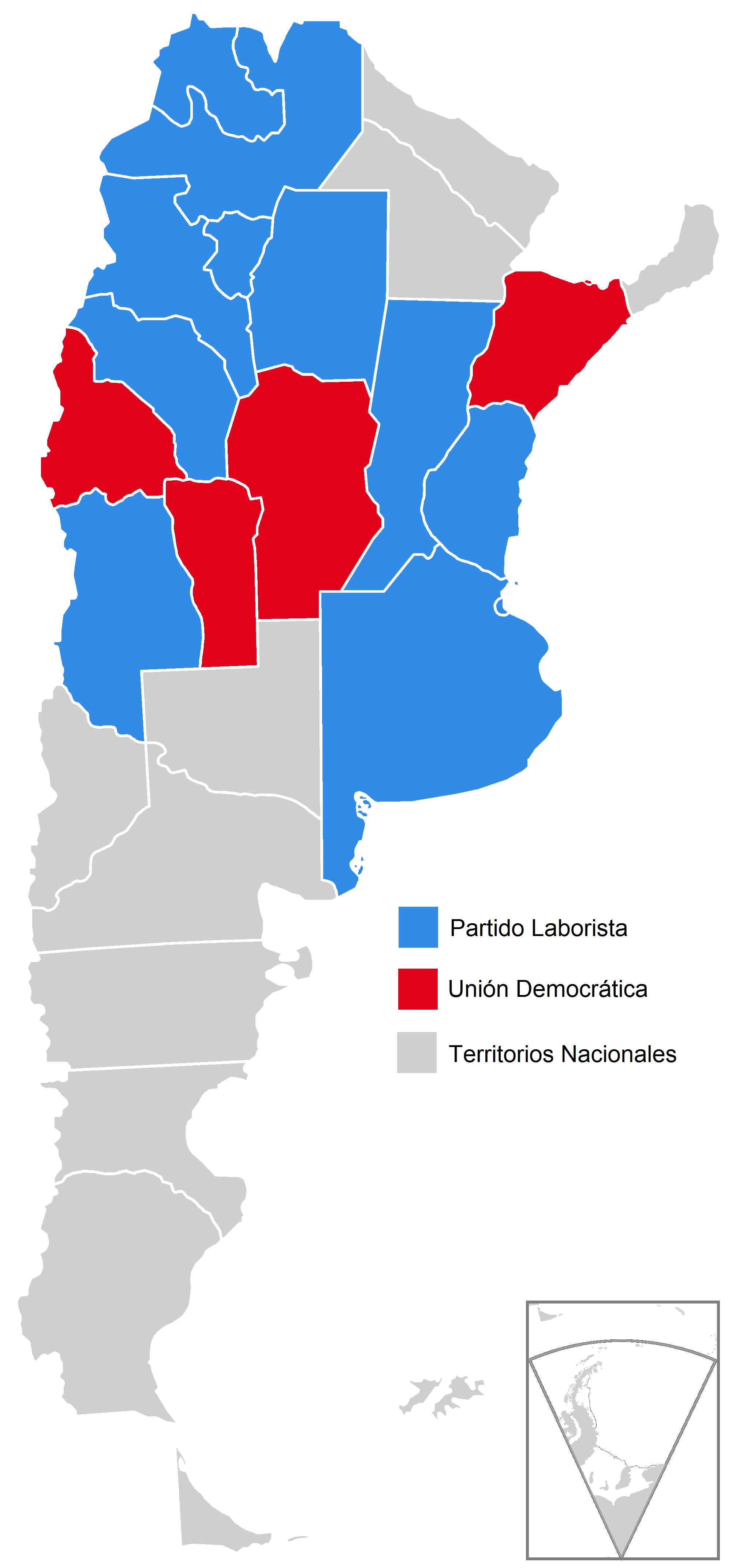 Mapa de las elecciones presidenciales de Argentina de 1946